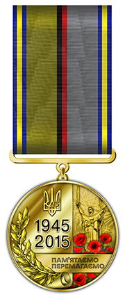 Ювілейна медаль «70 років Перемоги над нацизмом»